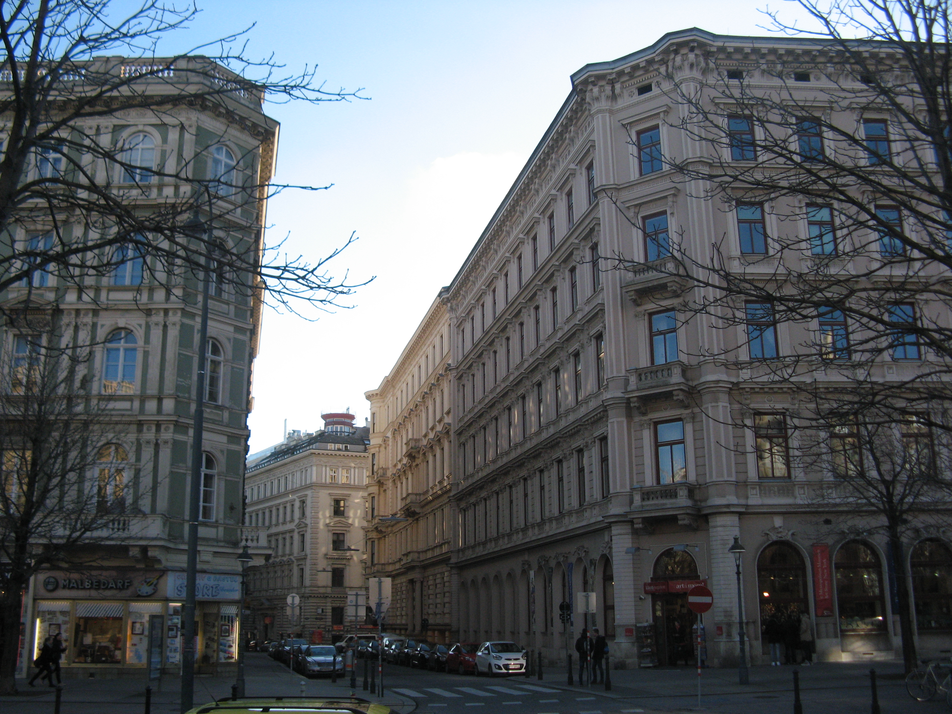 Elisabethstraße von der Babenbergerstraße in Richtung Osten, Wien-Innere Stadt